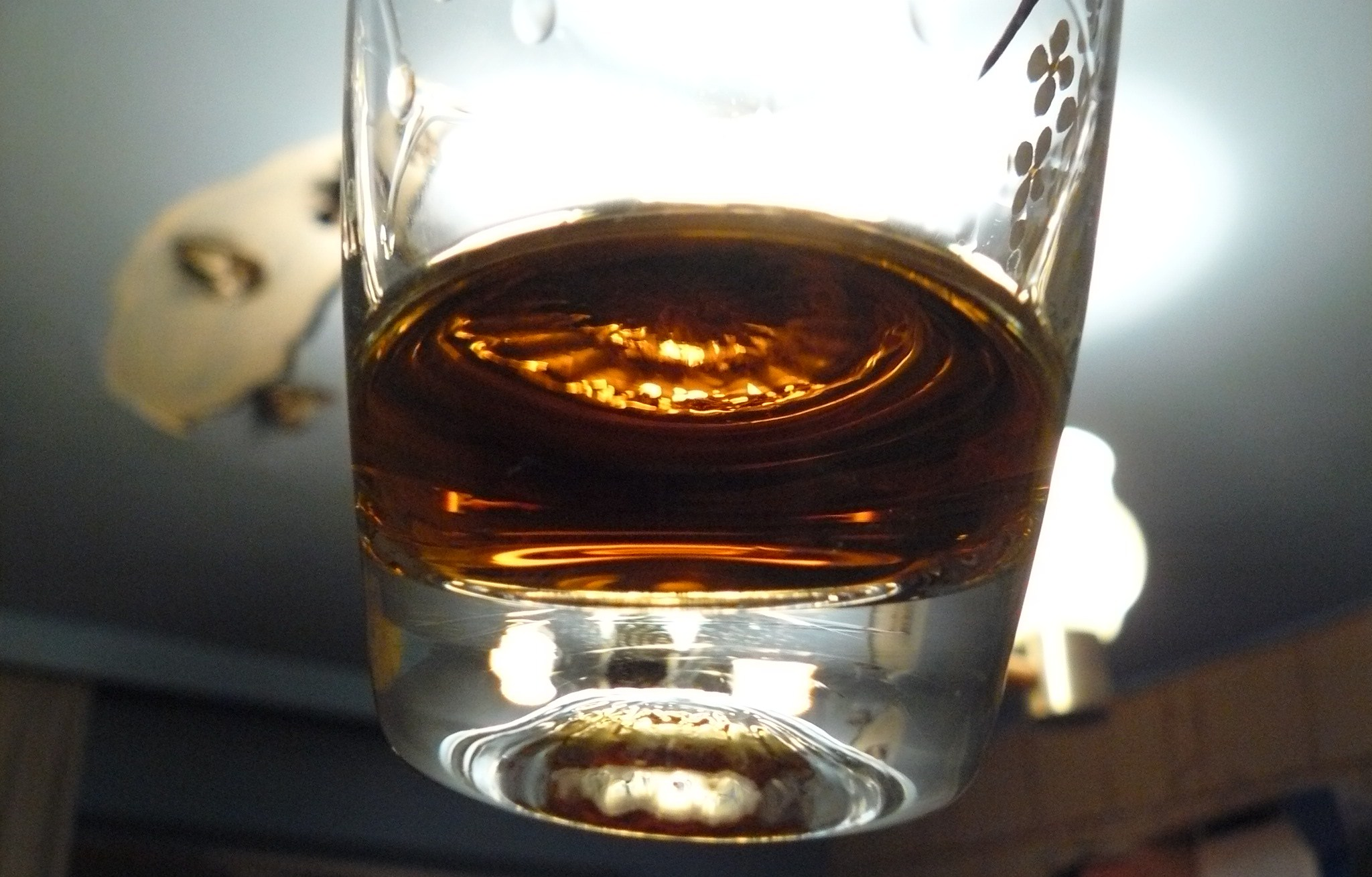 Rémy Martin w szklaneczce. Serwowany w Poznaniu.